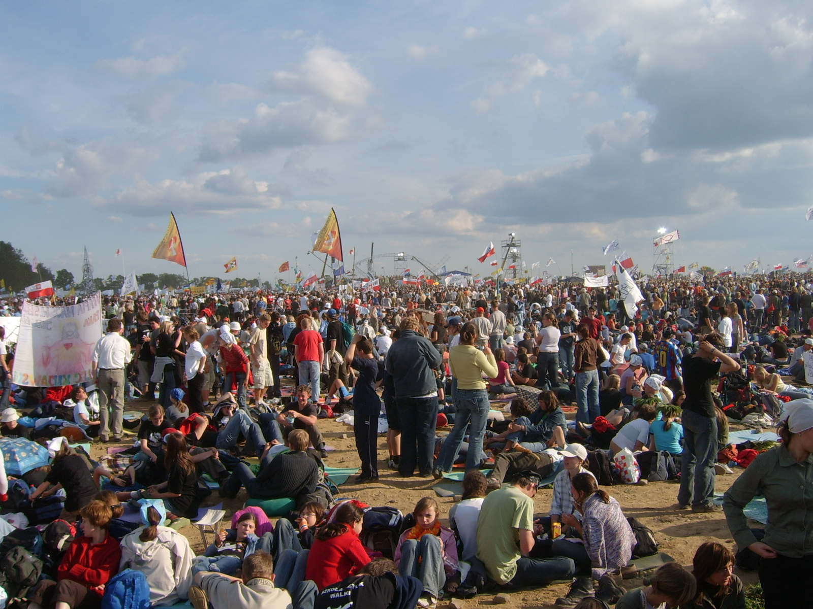 Ogólnopolskie Spotkania Młodzieży Lednica 2000 (rok: 2006) Autor: Cruizer